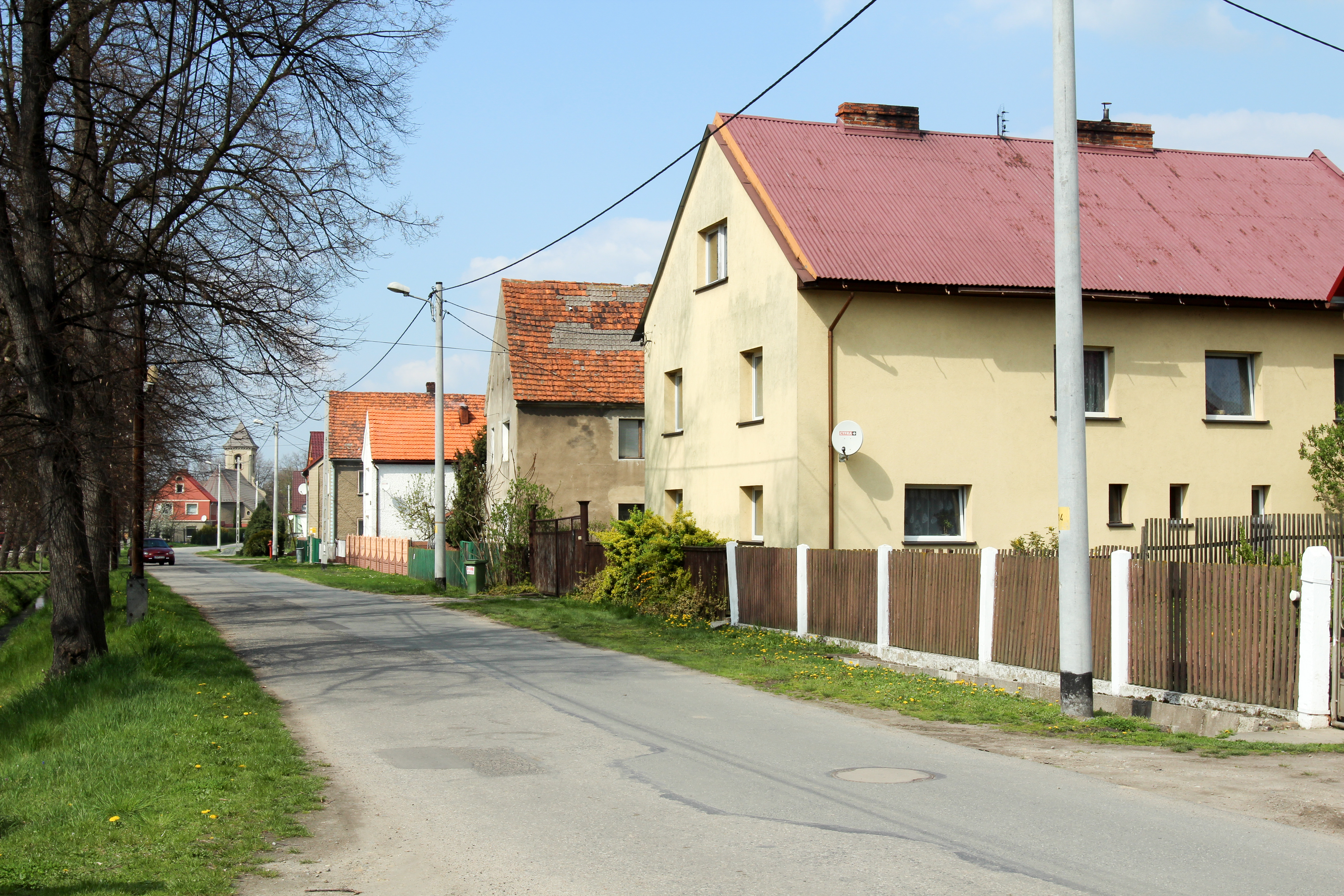 Kubice – wieś w Polsce położona w województwie opolskim, w powiecie nyskim, w gminie Nysa.